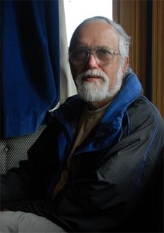 fotografie spisovatele Josef Pecinovský